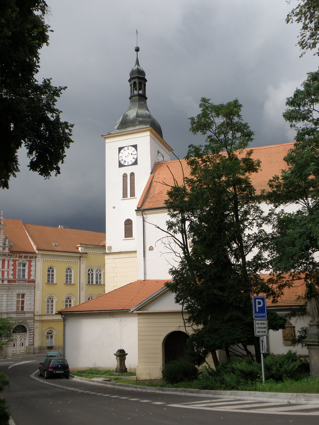 Kostel sv. Petra a Pavla (Bílina), Bílina, pohled od fary